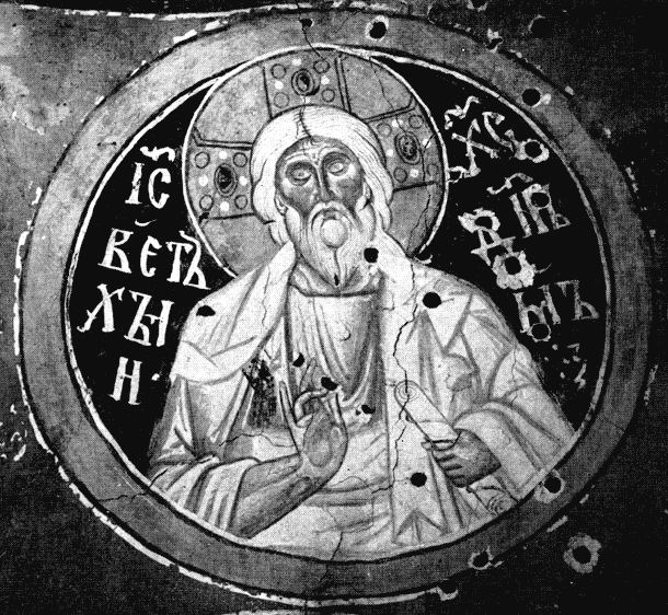 Иисус Христос Ветхий Денмифреска (ныне не сохранилась)